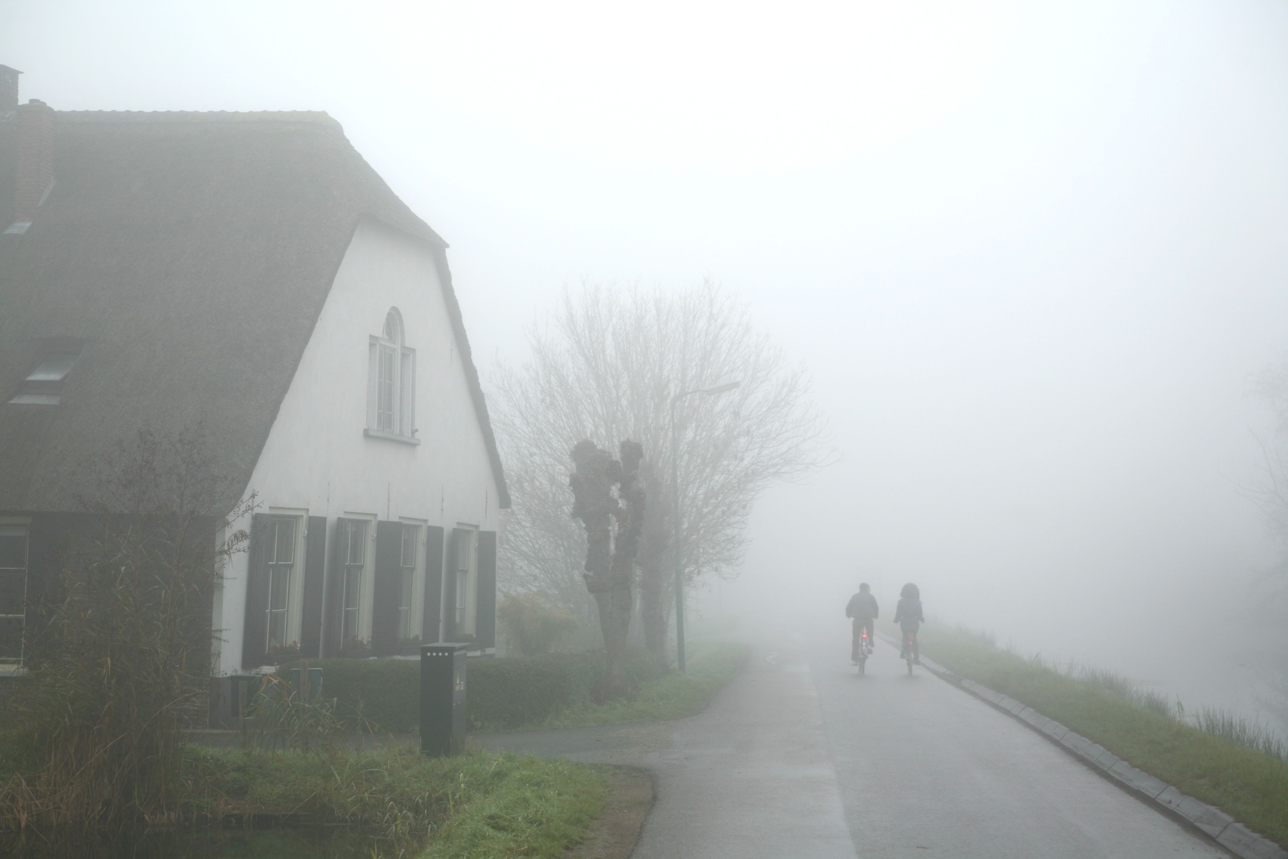 Monumentale boerderij aan de Wagendijk te Kockengen